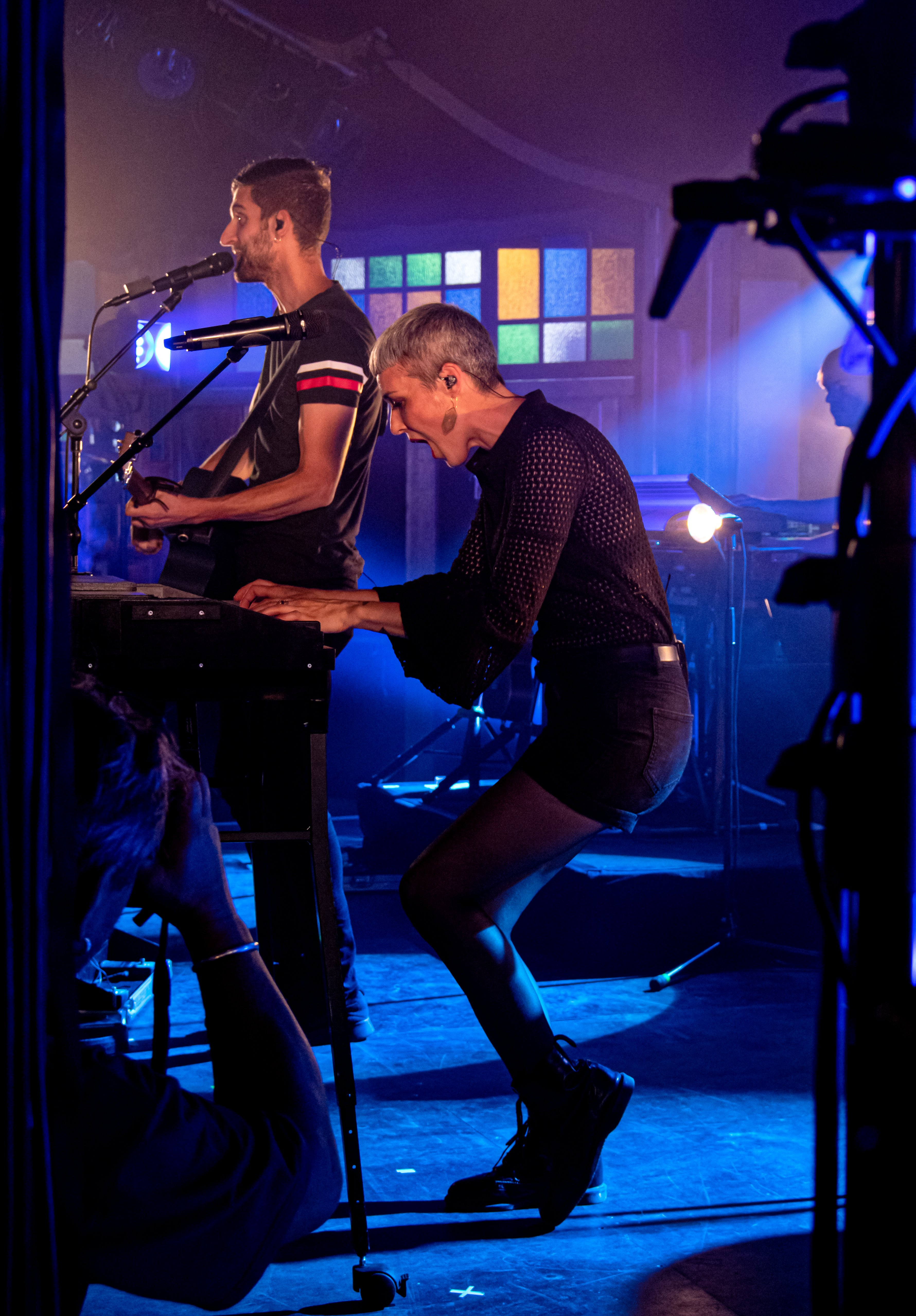 Bilder vom Zelt Musik Festival 2019 in Freiburg im Breisgau